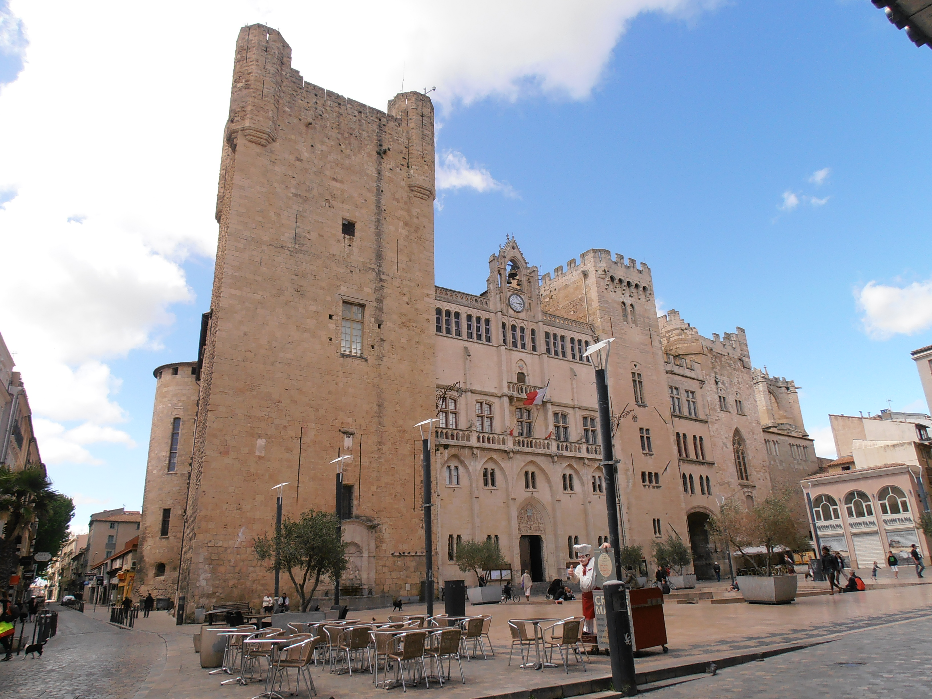 Palais des archevêques de Narbonne .